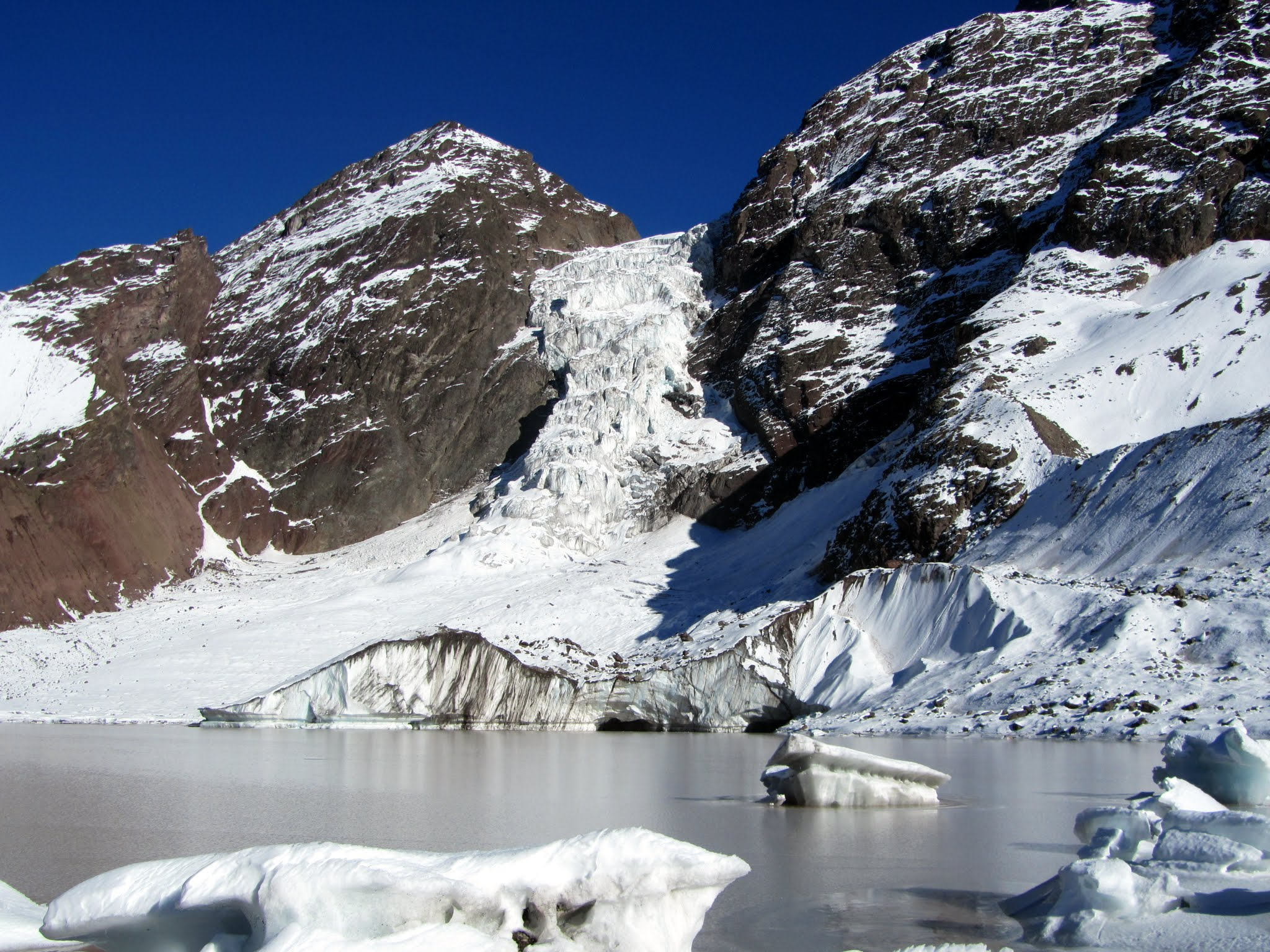 Laguna glaciar y Glaciar colgante - Monumento natural El Morado